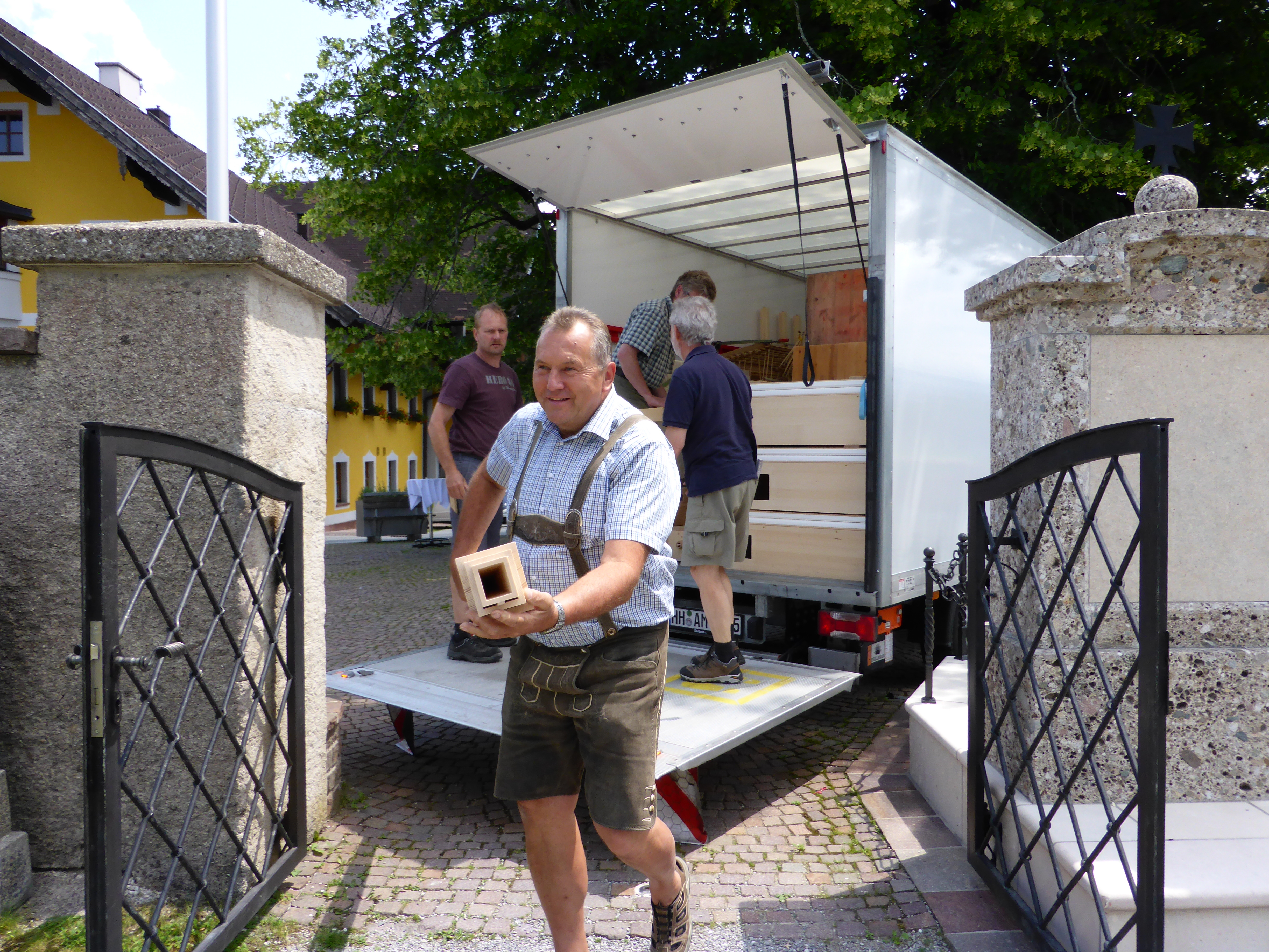 Josef Wörndl trägt die ersten Pfeifen in die Kirche, 5. Juni 2018